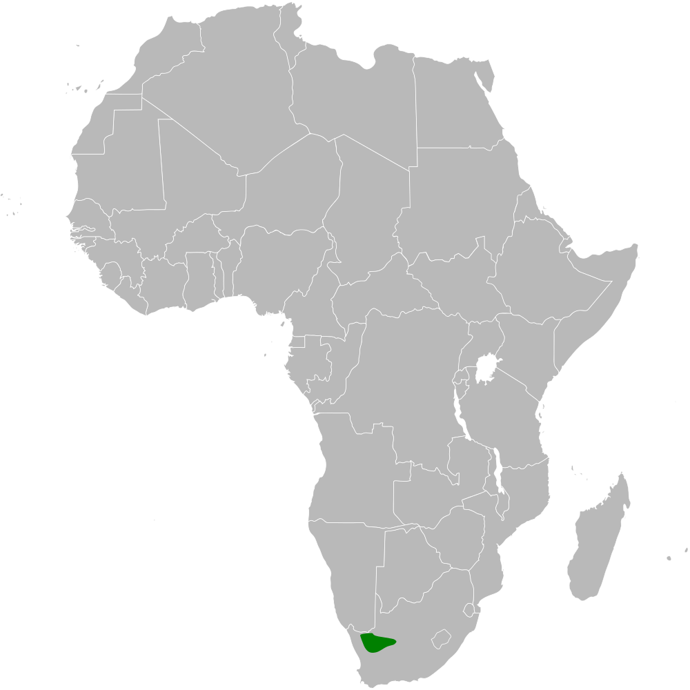 Calendulauda burra distribution map, based on